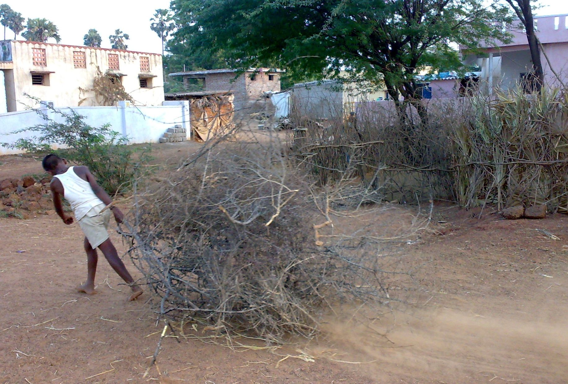 For Indian Festival Bhogi, the festival of bonfire (Celebrated mainly in South India) is the first day of Pongal (January). It is celebrated in honor of god Indra.